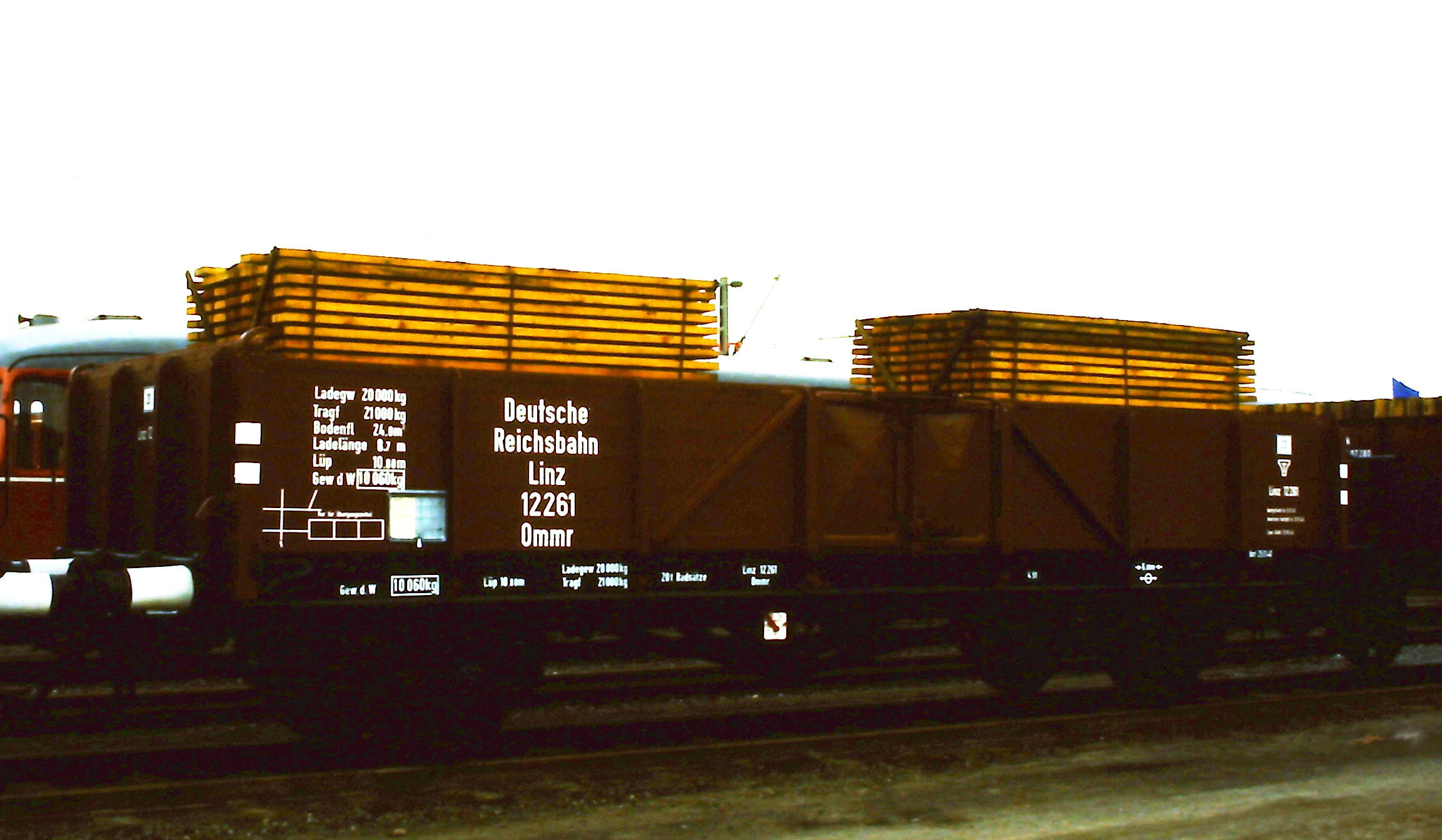 Güterwaggon Ommr - Bauart Linz - ausgestellt auf der Ausstellung 150 Jahre Eisenbahn in Deutschland in Bochum-Dahlhausen